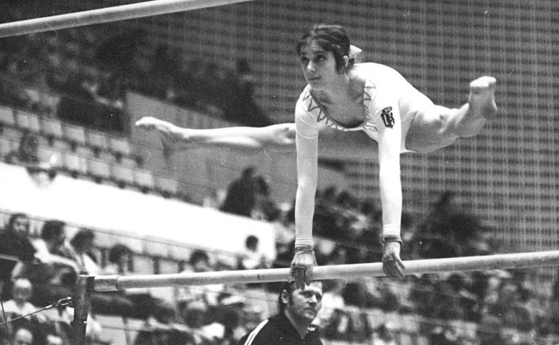 Kerstin Gerschau ADN-ZB Schaar 18.3.76-str-Suhl: DDR-Turnmeisterschaften der Frauen - Kerstin Gerschau (SC Chemie Halle) bei ihrer Pflichtübung am Stufenbarren. Nach dem ersten Wertungstag, dem Pflichtturnen am 17.3. in der Suhler "Stadthalle der Freundschaft" liegt die Leipzigerin mit 38,40 Punkten auf dem sechsten Rang.